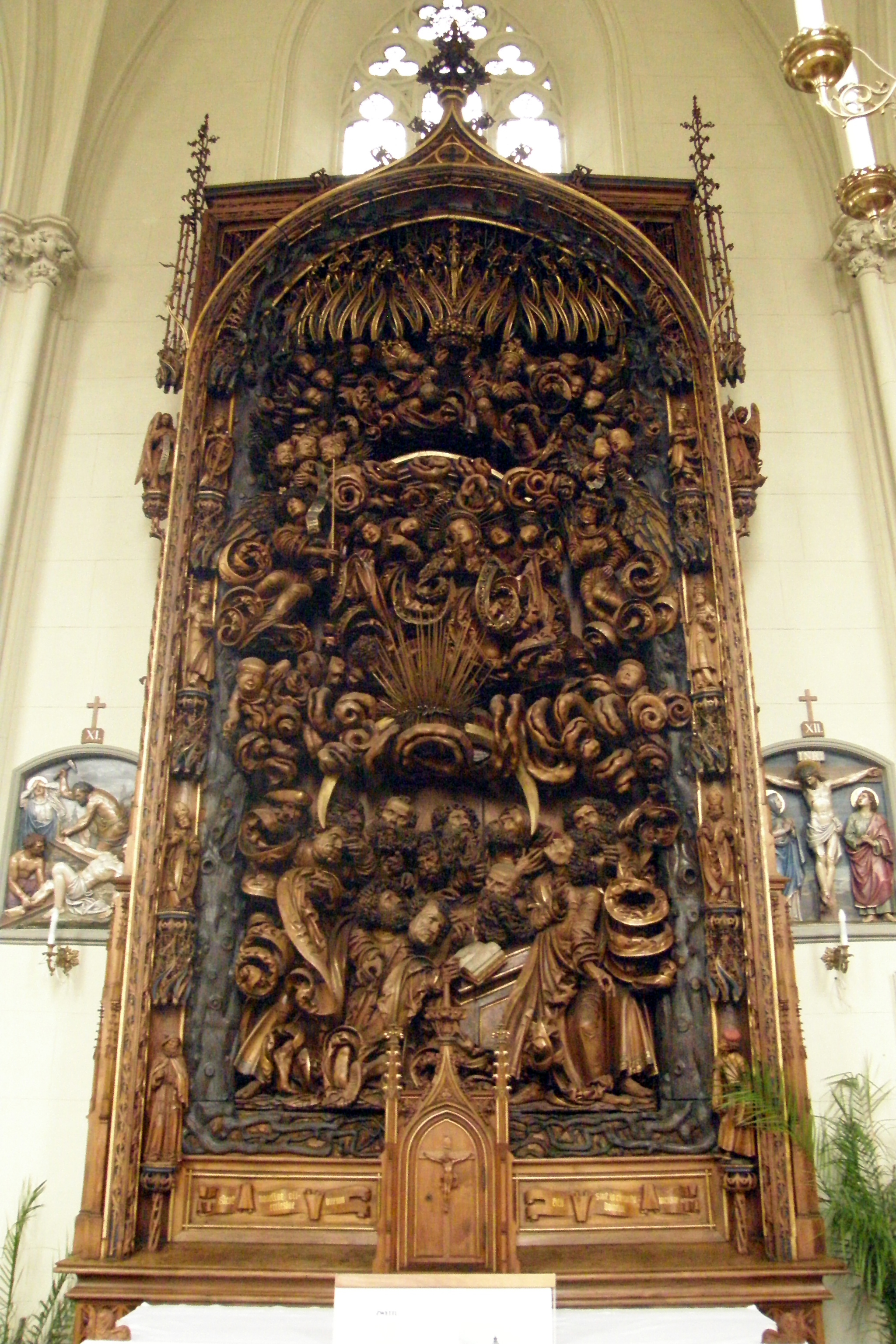 Světelský oltář v kostele svaté Barbory v Adamově